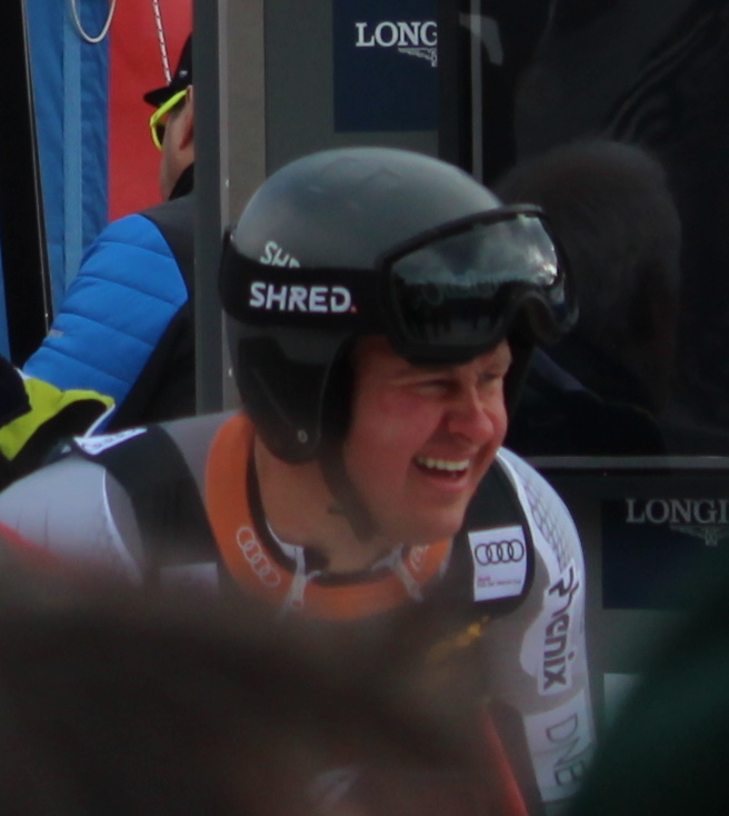 Lo sciatore norvegese Adrian Smiseth Sejersted al traguardo della Pista Stelvio di Bormio, durante la discesa libera del 27 dicembre 2019, valida per la Coppa del Mondo di sci 2019-2020.